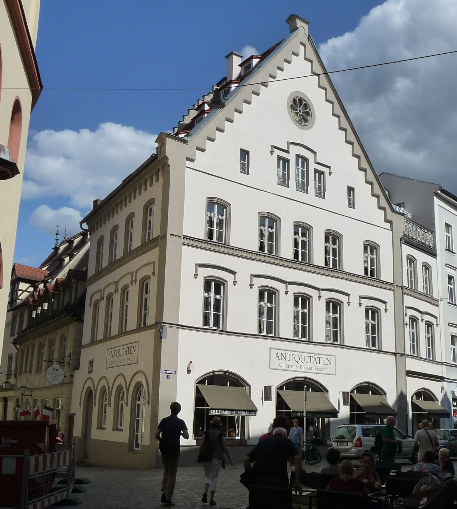 Haus